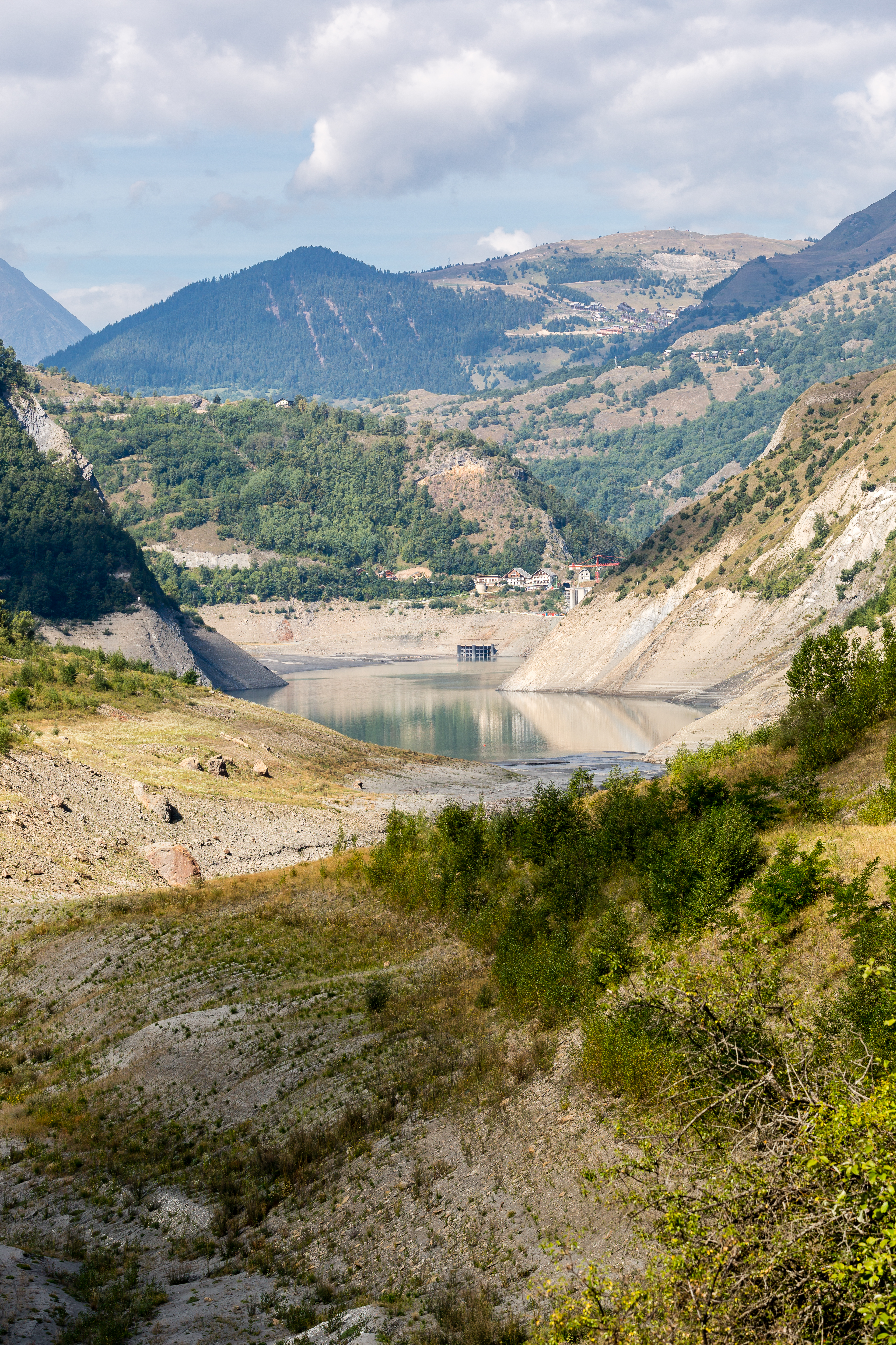 Le lac du Chambon vidangé à l'occasion de travaux de confortement du barrage pendant l'été 2013.